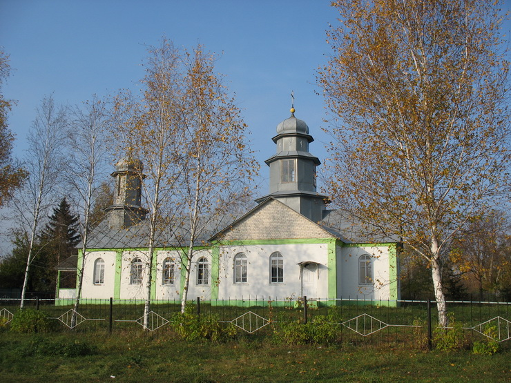 Україна, Чернігівська обл., Менський р-н, С. Киселівка. Миколаївська церква, новобудова, кінець ХХ ст. Архітектурний стиль - московський єпархіальний (синодальний)